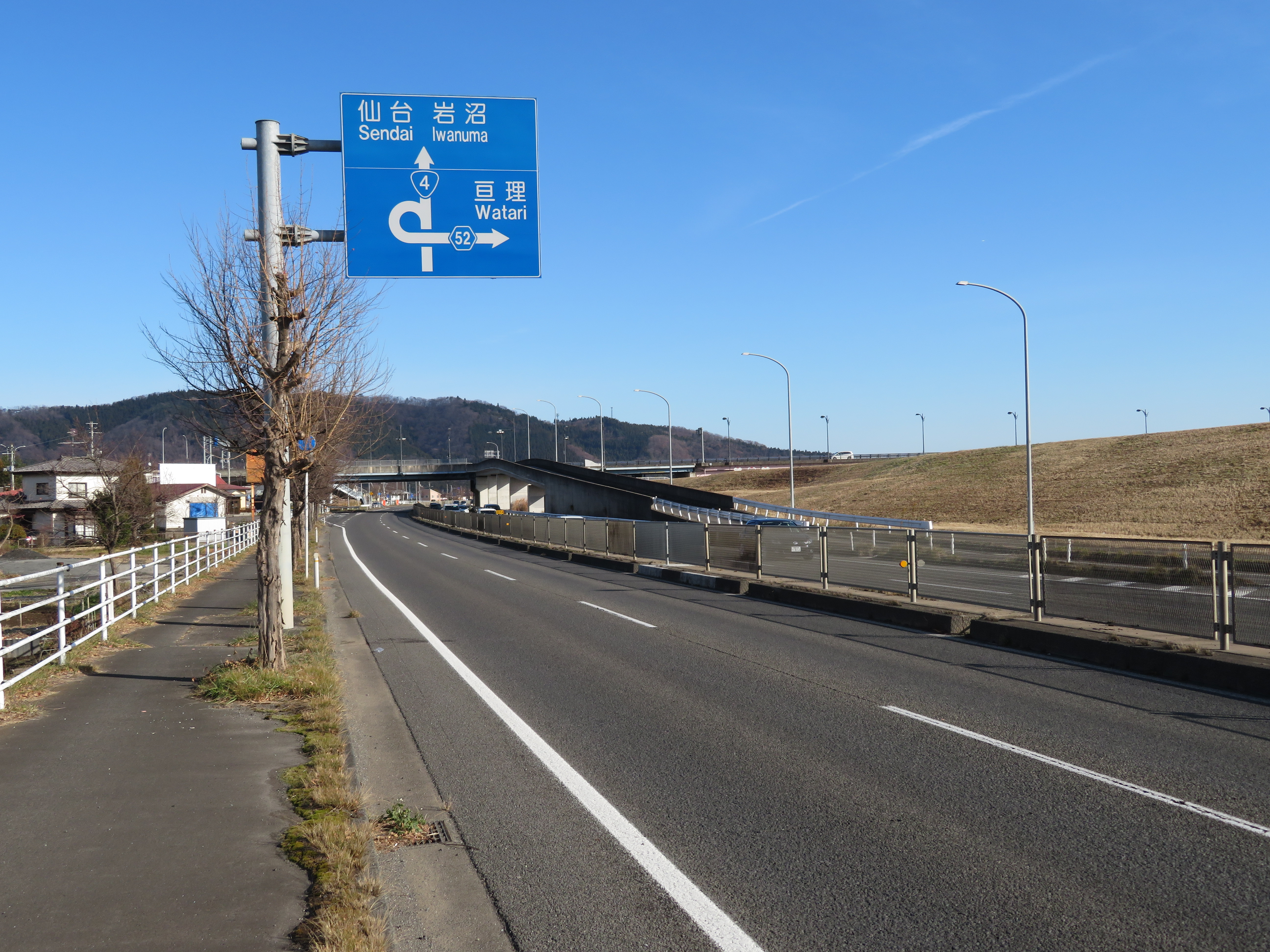 国道4号線柴田バイパス 宮城県柴田郡柴田町槻木下町３丁目付近（岩沼方面を撮影） Canon PowerShot SX720 HS